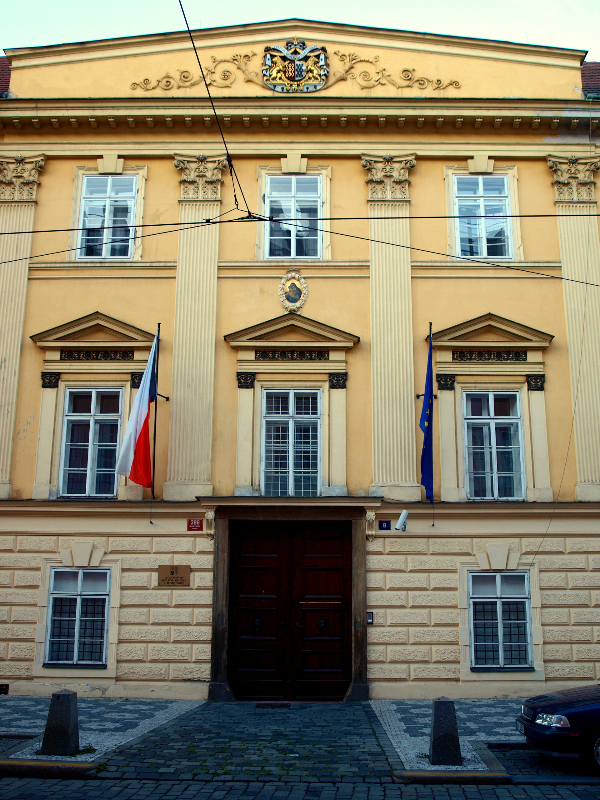 Rohanský palác z Karmelitské ulice